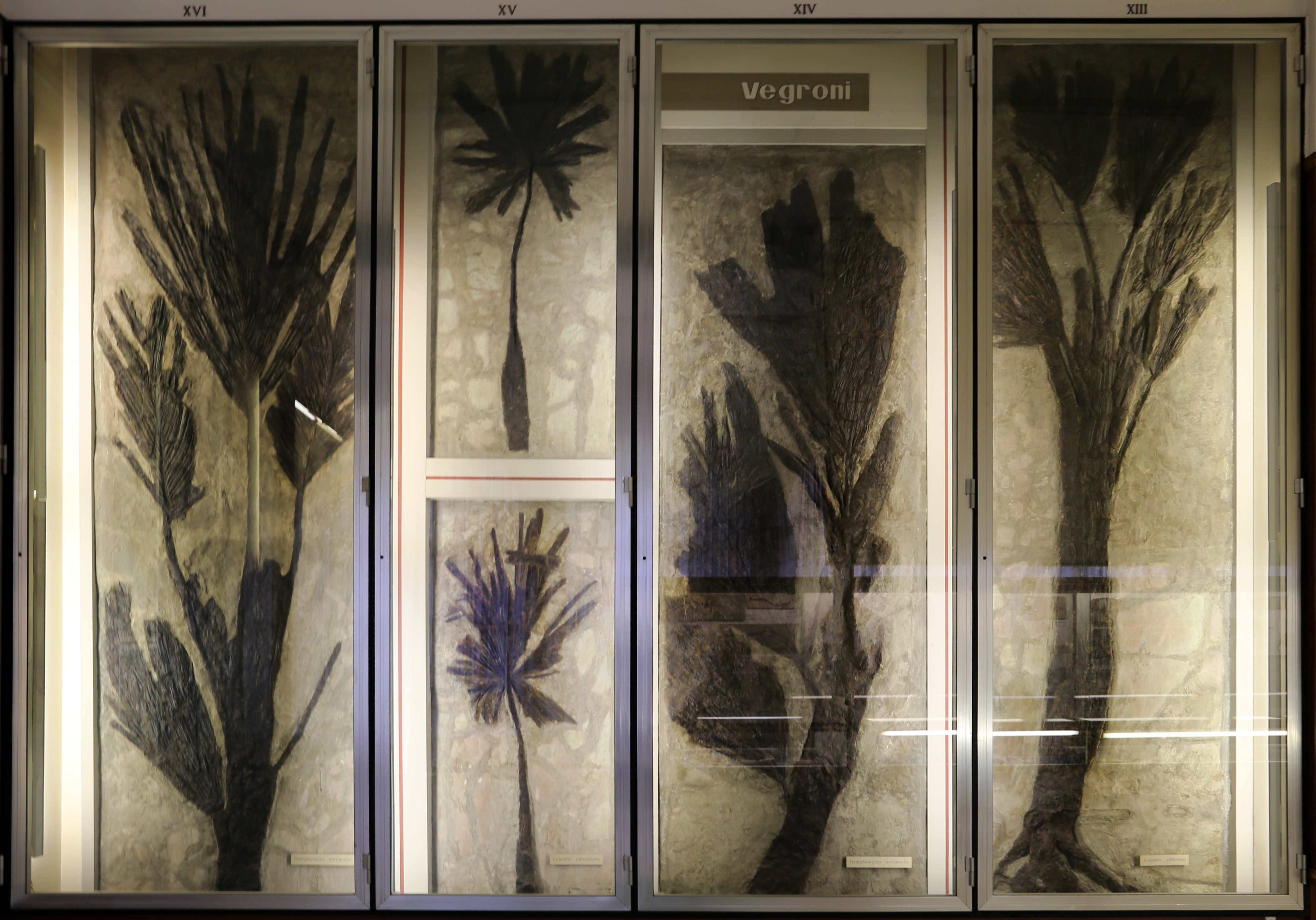 Museo civico di storia naturale di Verona This is a photo of a monument which is part of cultural heritage of Italy.